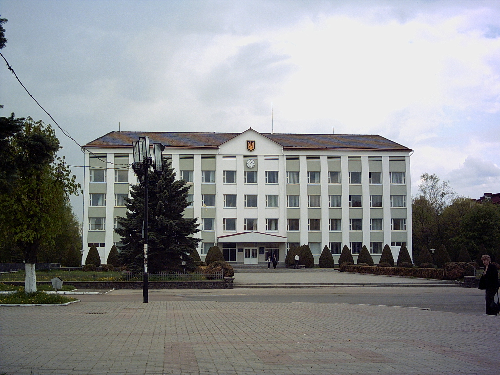 Білий дім